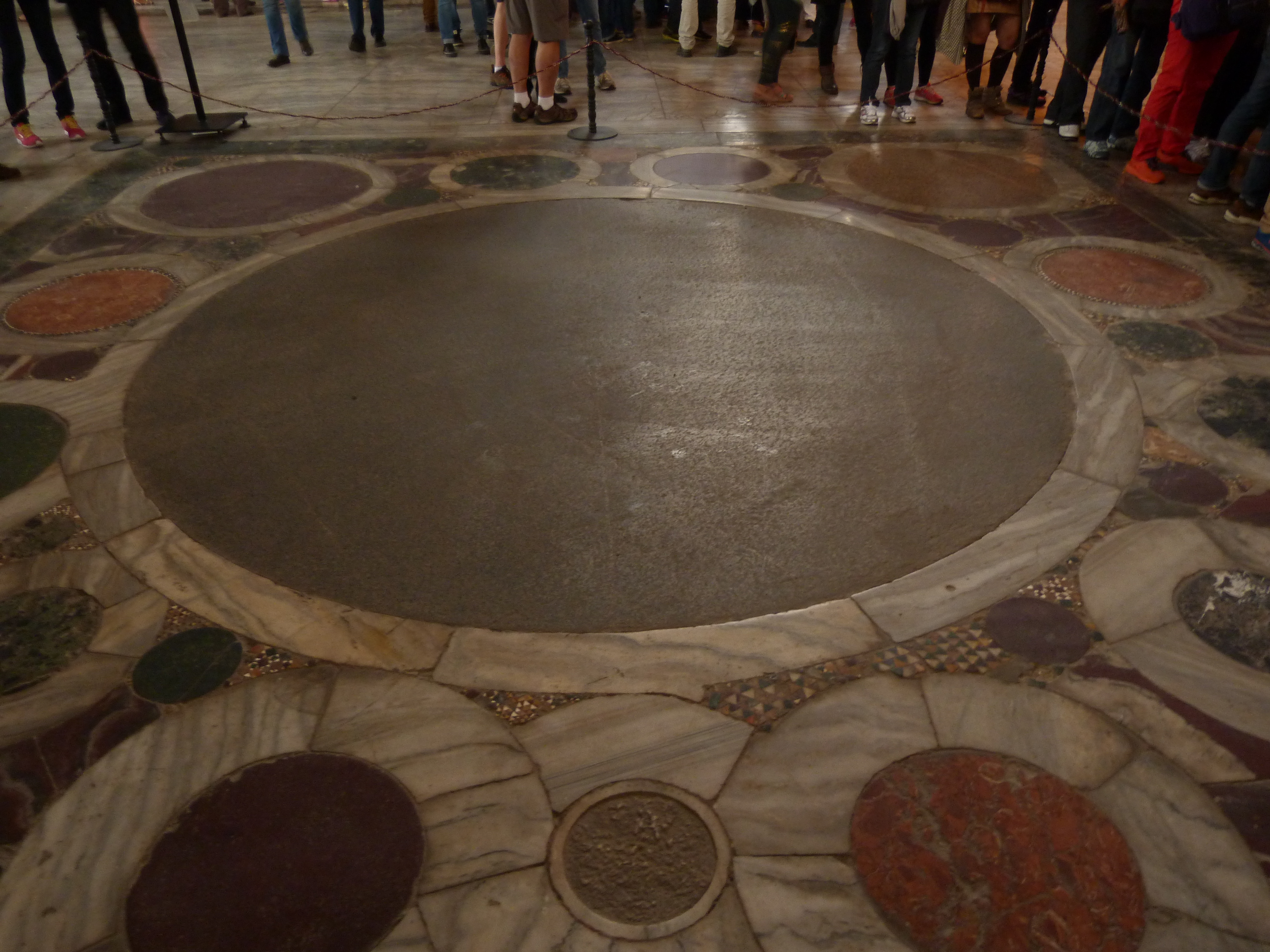 A felvétel 2014. október 23-án csütörtökön készült. Törökország, Isztambul. Hagia Szophia. Az Isteni Bölcsesség temploma. Az 563 december 24-én felszentelt keresztény templom mintegy ezer évig a Konstantinápolyi Patriarchátus székhelye, a Bizánci Birodalom szellemi központja. Konstantinápoly török meghódítása után fődzsámi, majd 1935-től napjainkig múzeum. Trónoló Istenanya a gyermek Jézussal, Nagy Konstantin és Justiniánus. Az apszisbeli imafülke két oldalán gyertyatartók, II. Szulejmán Buda első elfoglalásakor szerzett hadizsákmánya. ©© Derzsi Elekes Andor, Budapest, 2014, A kép egészben, vagy részletekben másolását, bármilyen úton történő sokszorosítását és felhasználását a szerző ellenérték nélkül, jogutódjaira is kihatóan megengedi. Az engedély kiterjed a kereskedelmi célú hasznosításra is. Kéri azonban nevének feltüntetését a felhasználás során. A Metapolisz sorozat valamennyi képe és filmje Creative Commons alatti valamint kereskedelmi - for profit - célra is felhasználható. Ajánlott hivatkozás: Derzsi Elekes Andor: Metapolisz DVD line